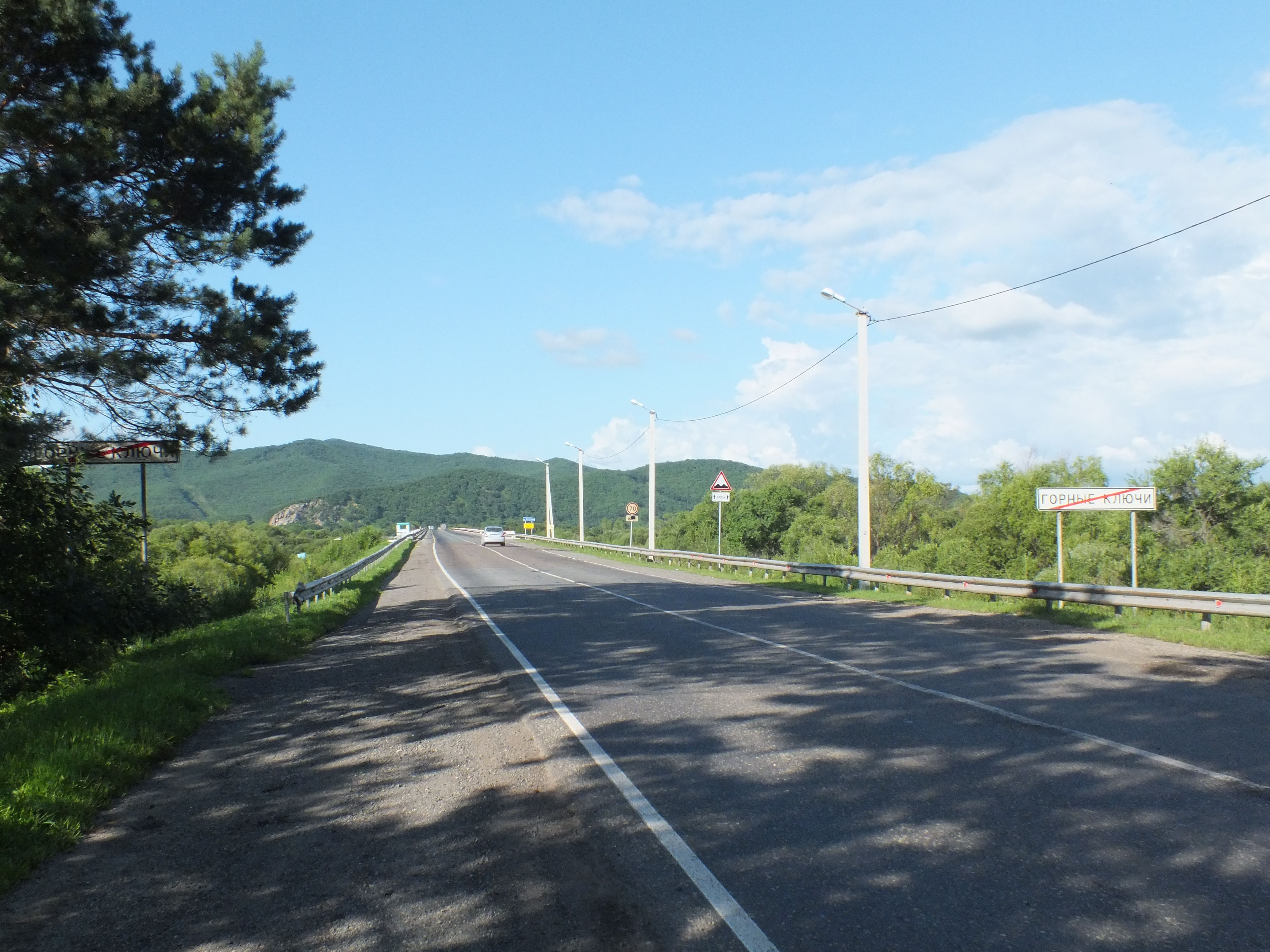 Bridge over Ussuri River in Primorsky Krai on border of Gornyye Klyuchi settlement